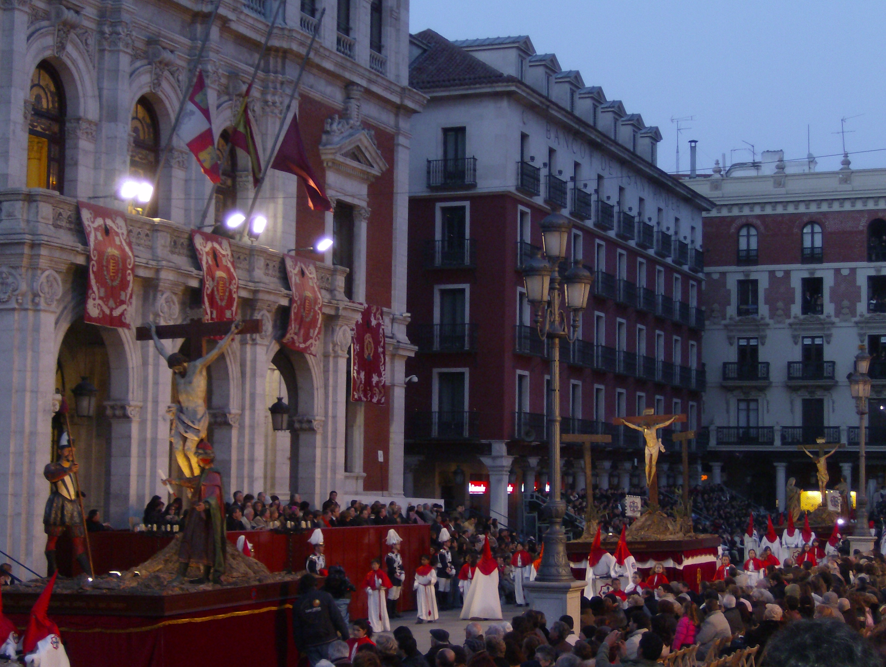 Procesion General de Valladolid a su paso por la Plaza Mayor